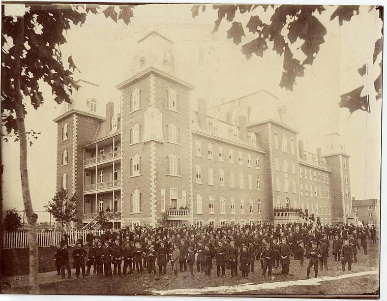 Séminaire à tourelles, Trois-Rivières, 1885.